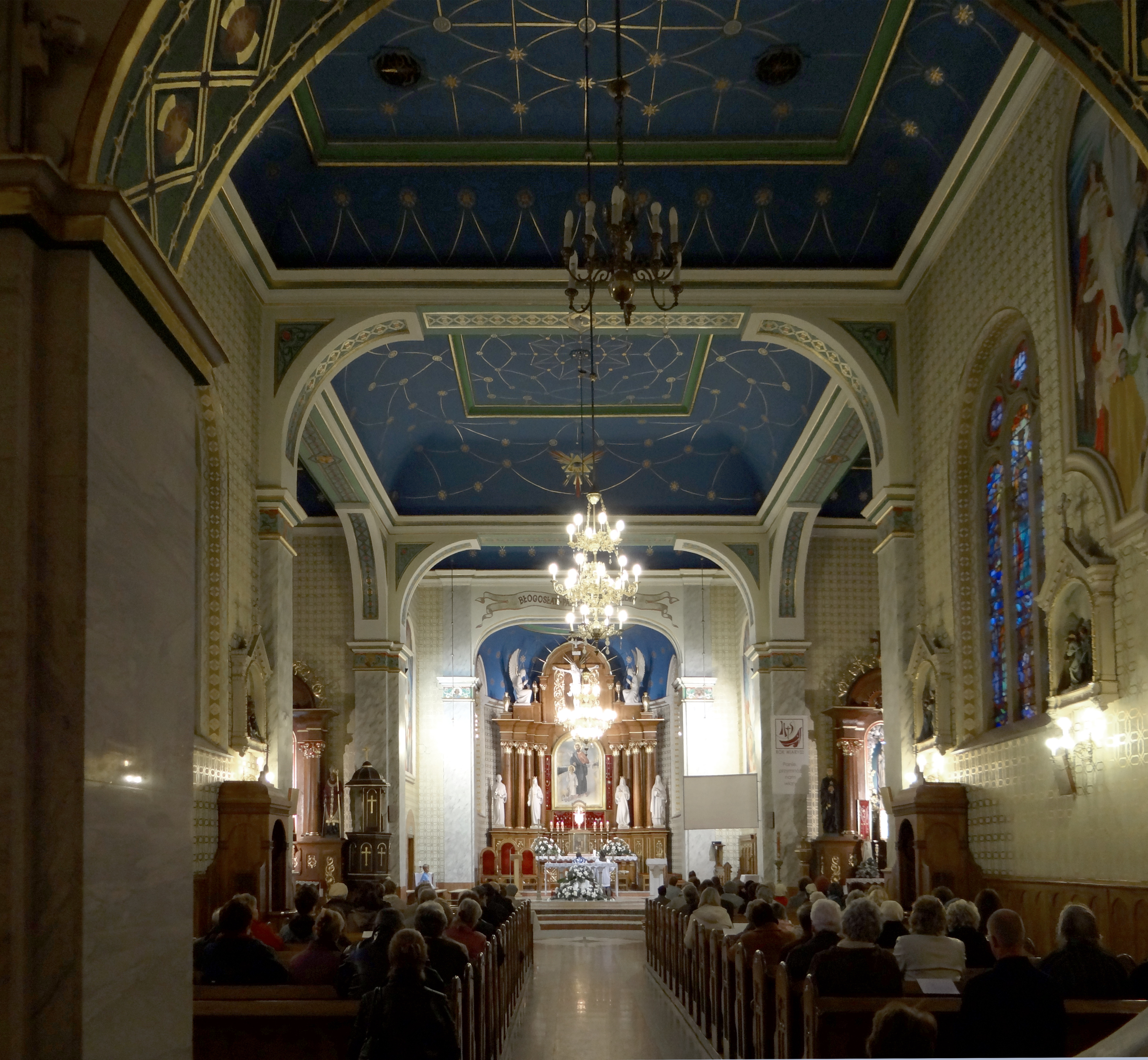 Nisko - Sanktuarium Świętego Józefa - wnętrze